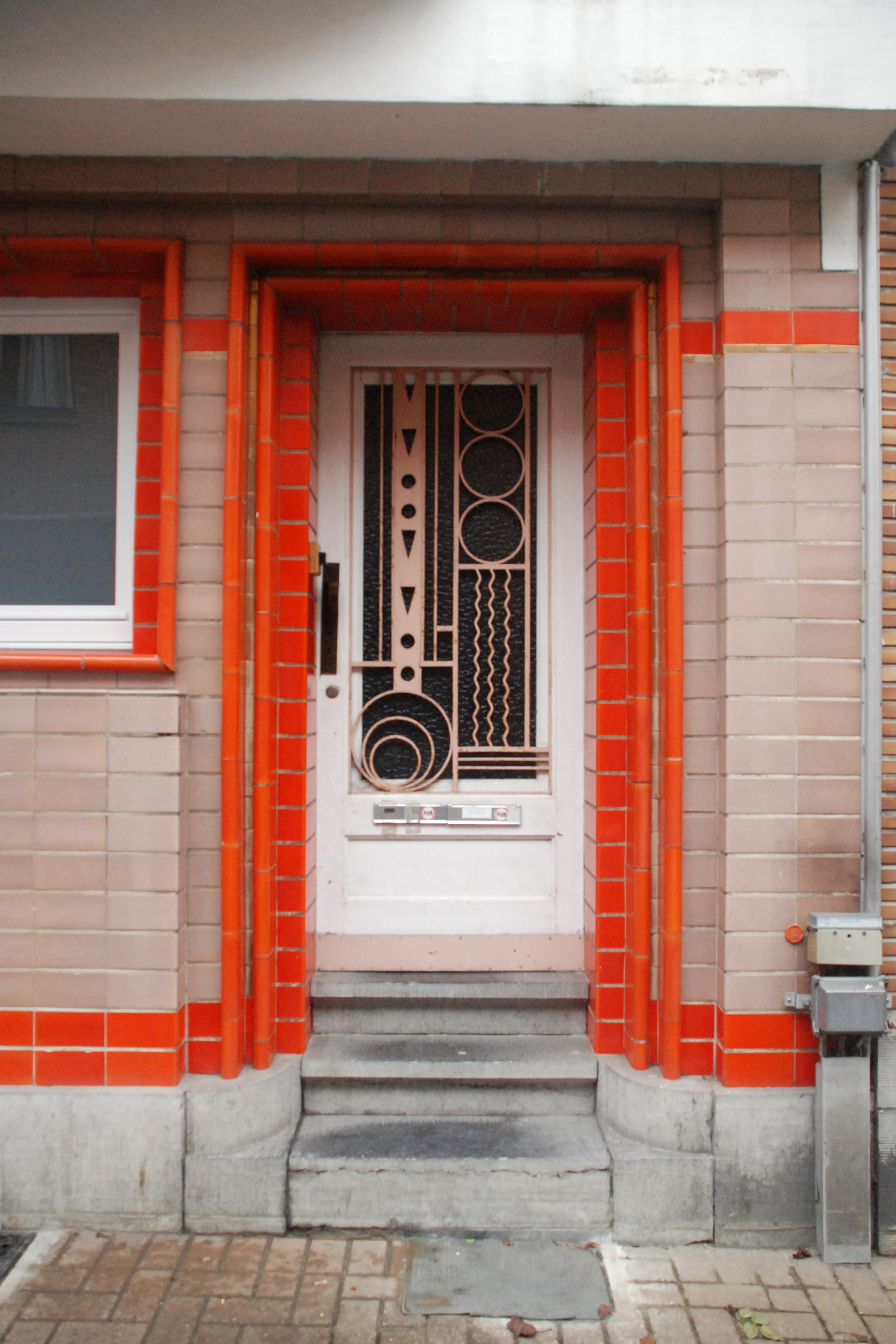 Belgique - Bruxelles - Berchem-Sainte-Agathe - Modernisme - Ateliers Helman